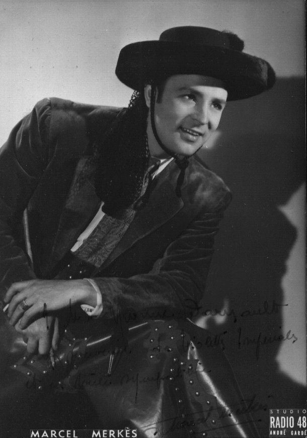 Portrait de Marcel Merkes dans Violettes Impériales